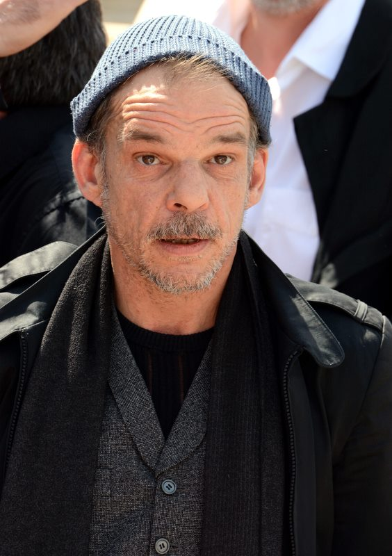 Denis Lavant au festival de Cannes